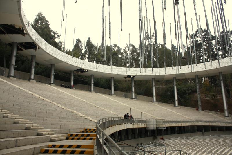 Anfiteatro de la Quinta Vergara, donde se lleva a cabo todos los años el Festival de la Canción de Viña del Mar.